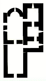 Mingəçevir Kilsə kompleksində dörd nömrəli məbədin planı